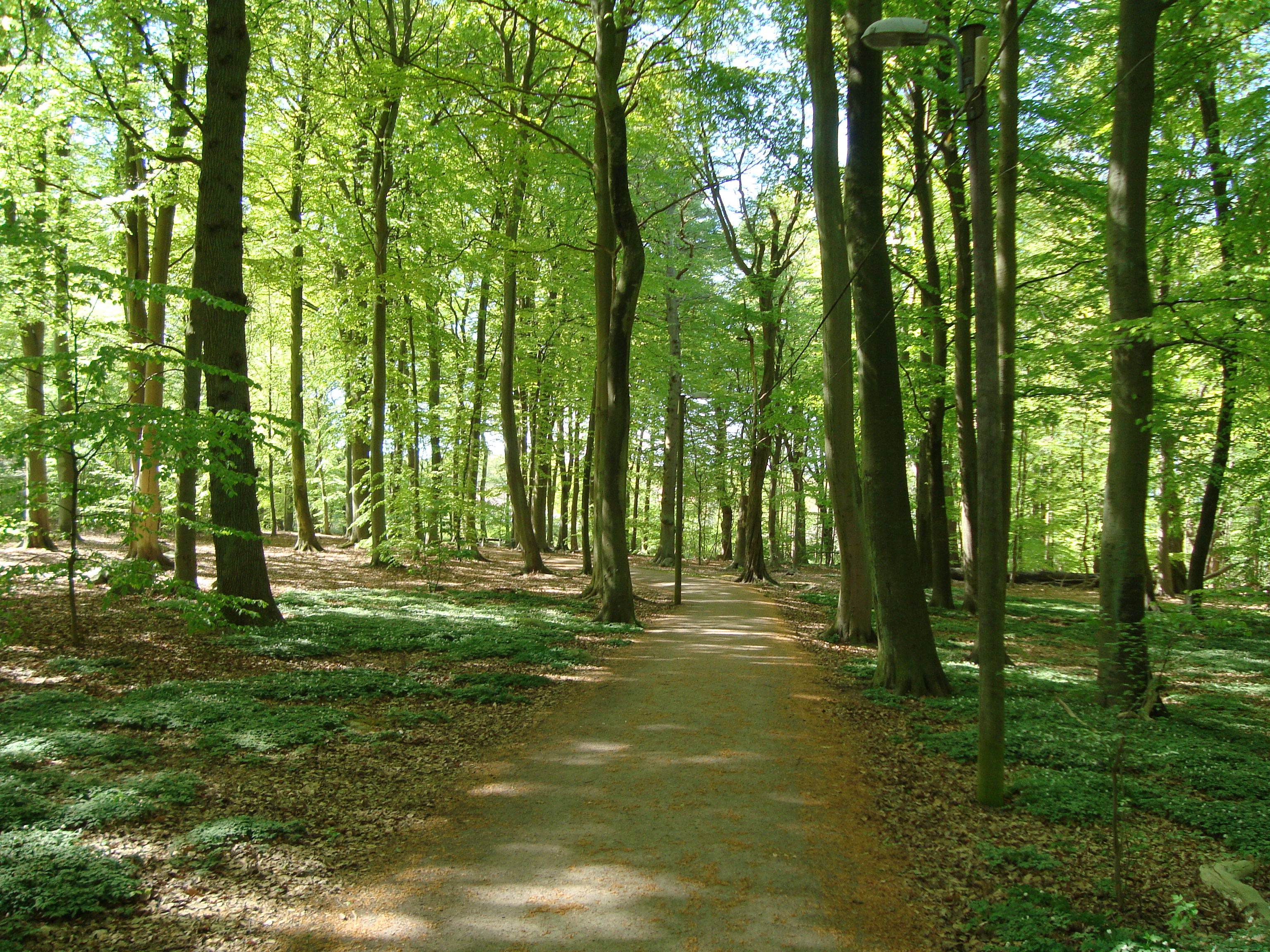 Vår i Pålsjö skog i Helsingborg.